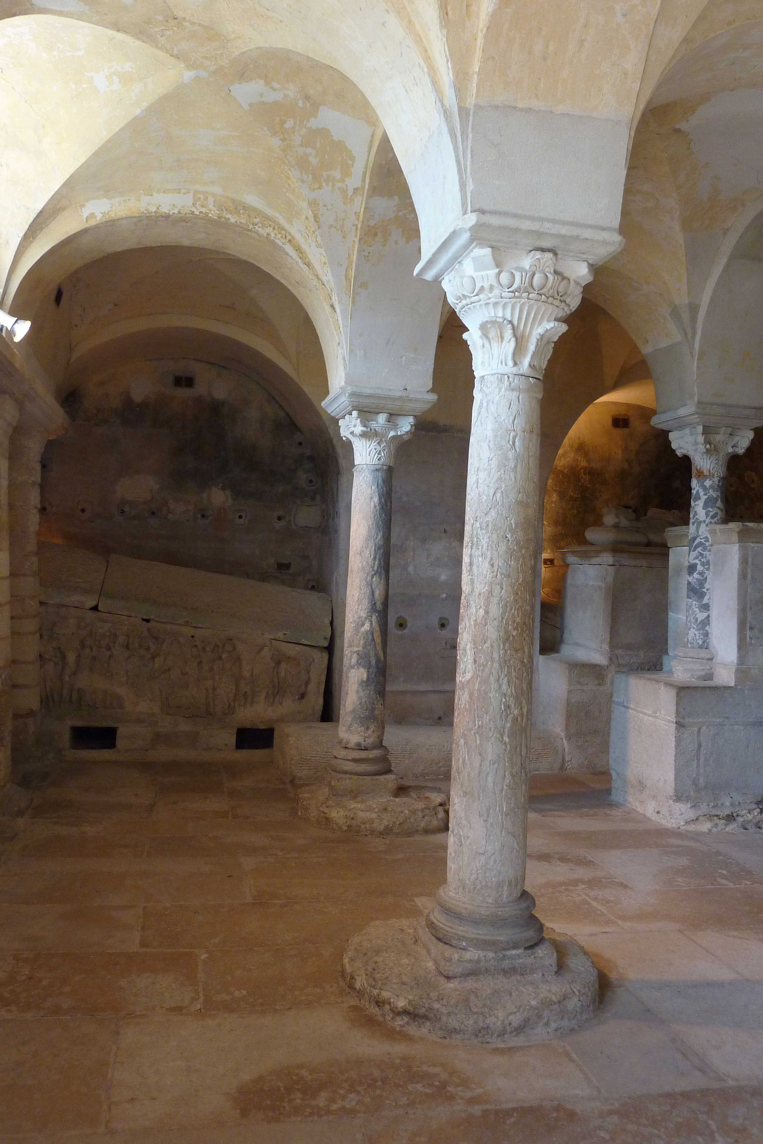 Crypte Saint-Paul in Jouarre